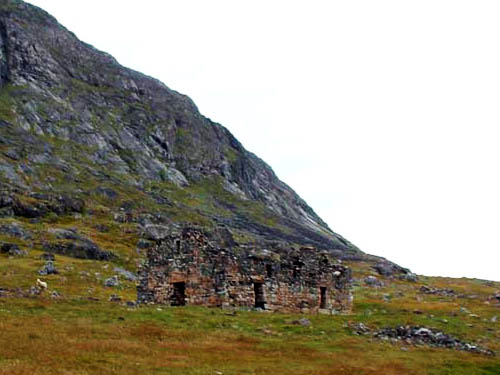 Kirchenruine von Hvalsey